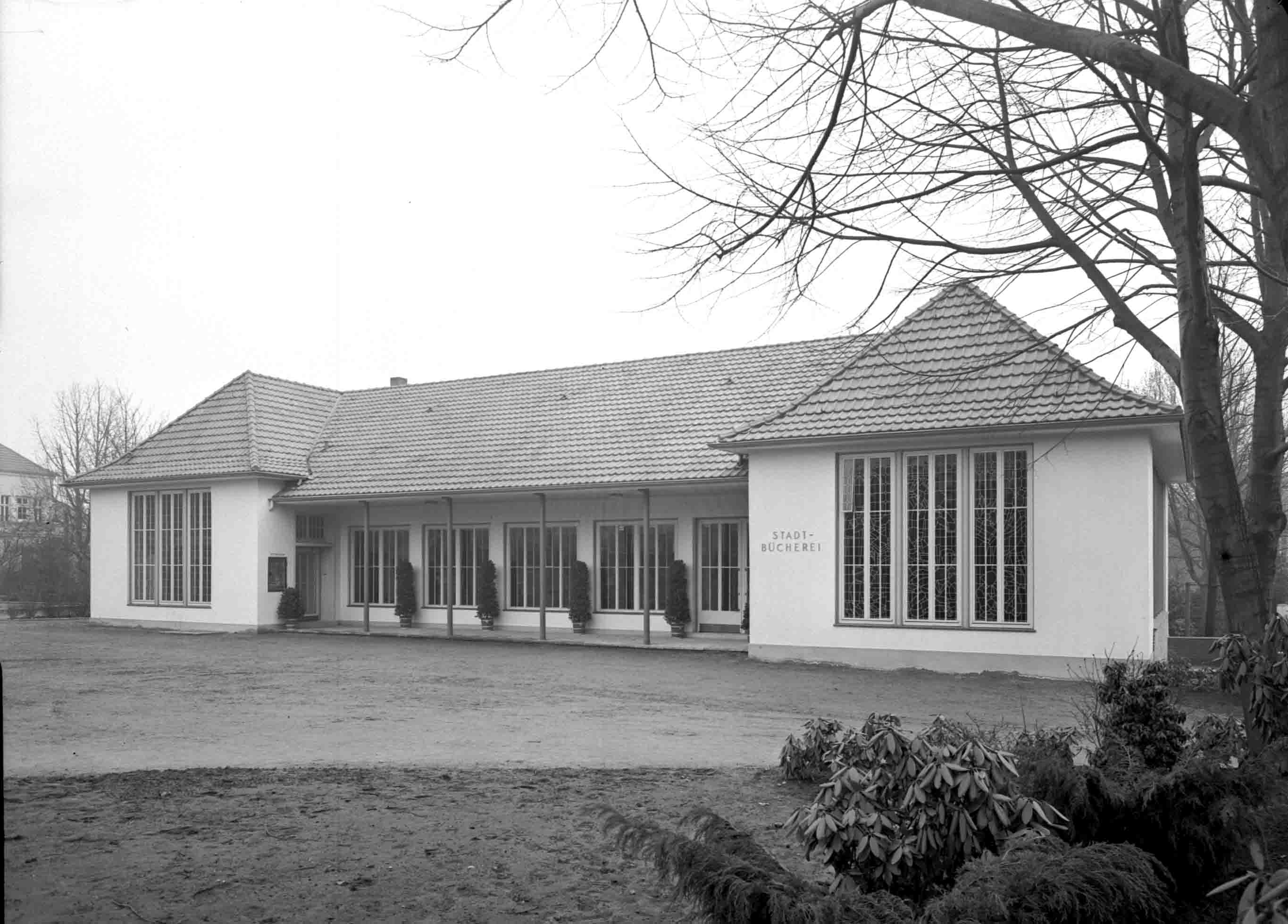 Das neue Gebäude der Freihandbücherei Gladbeck 1954